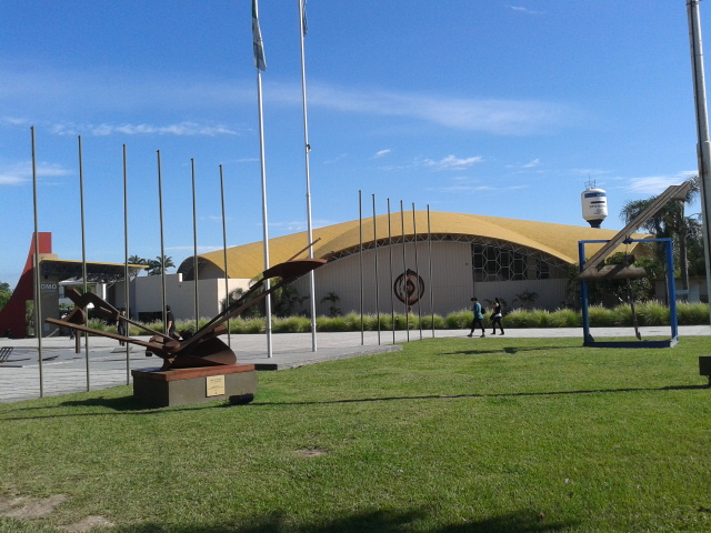 Domo del Centenario, Av. de los Inmigrantes 1001, Resistencia, Argentina